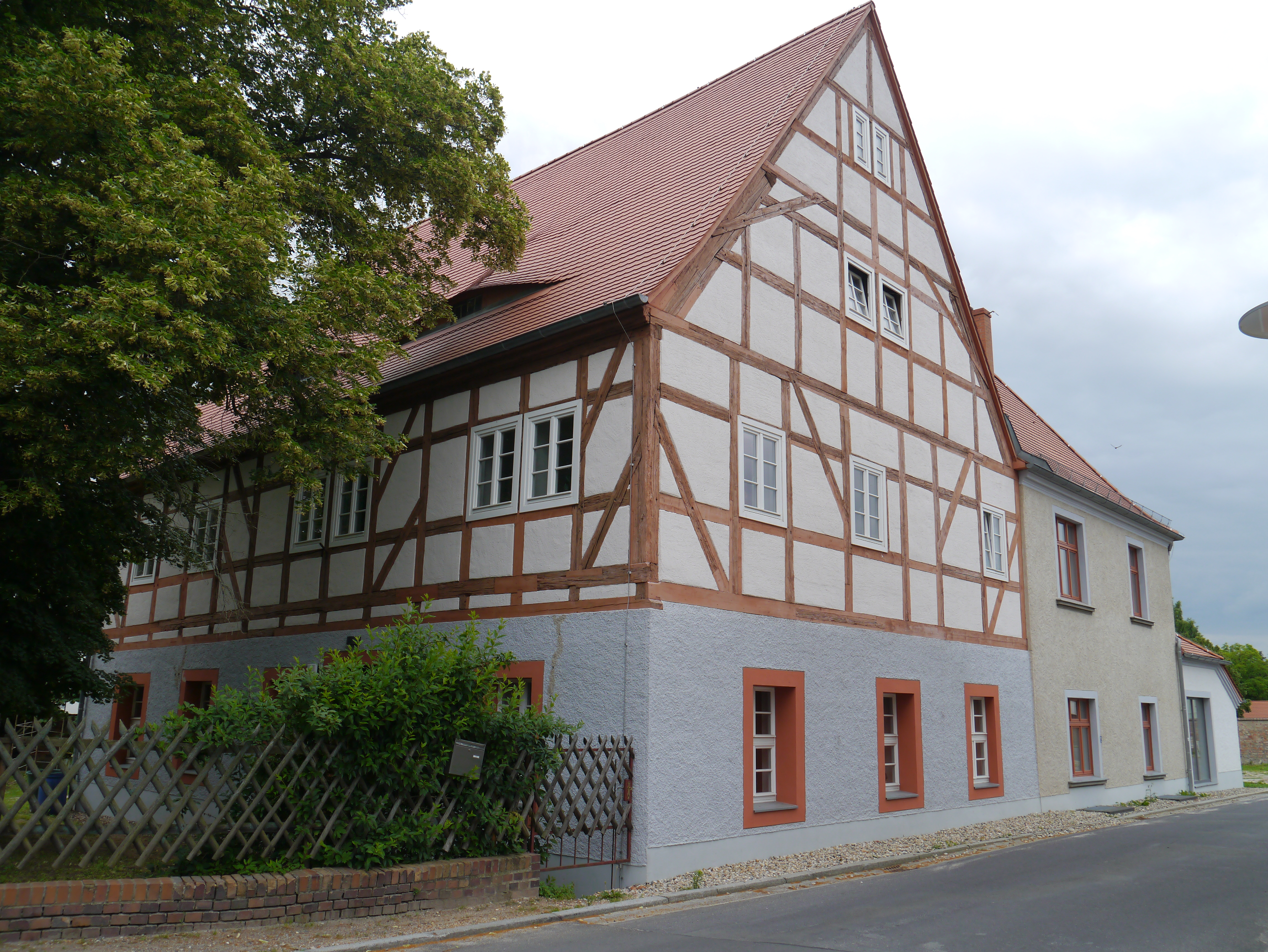 Altes Pfarrhaus in Doberlug-Kirchhain (OT Doberlug), Hauptstrasse 81 unweit des Doberluger Schlosses, Baudenkmal.